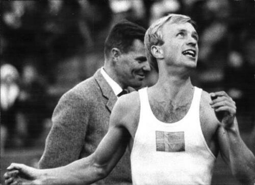 Hans Lagerqvist